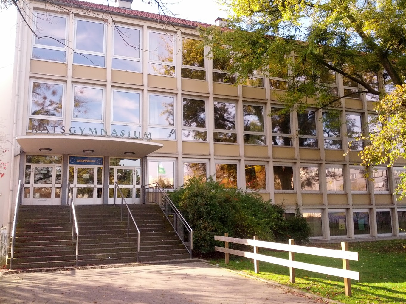 Haupteingang Ratsgymnasium Wolfsburg